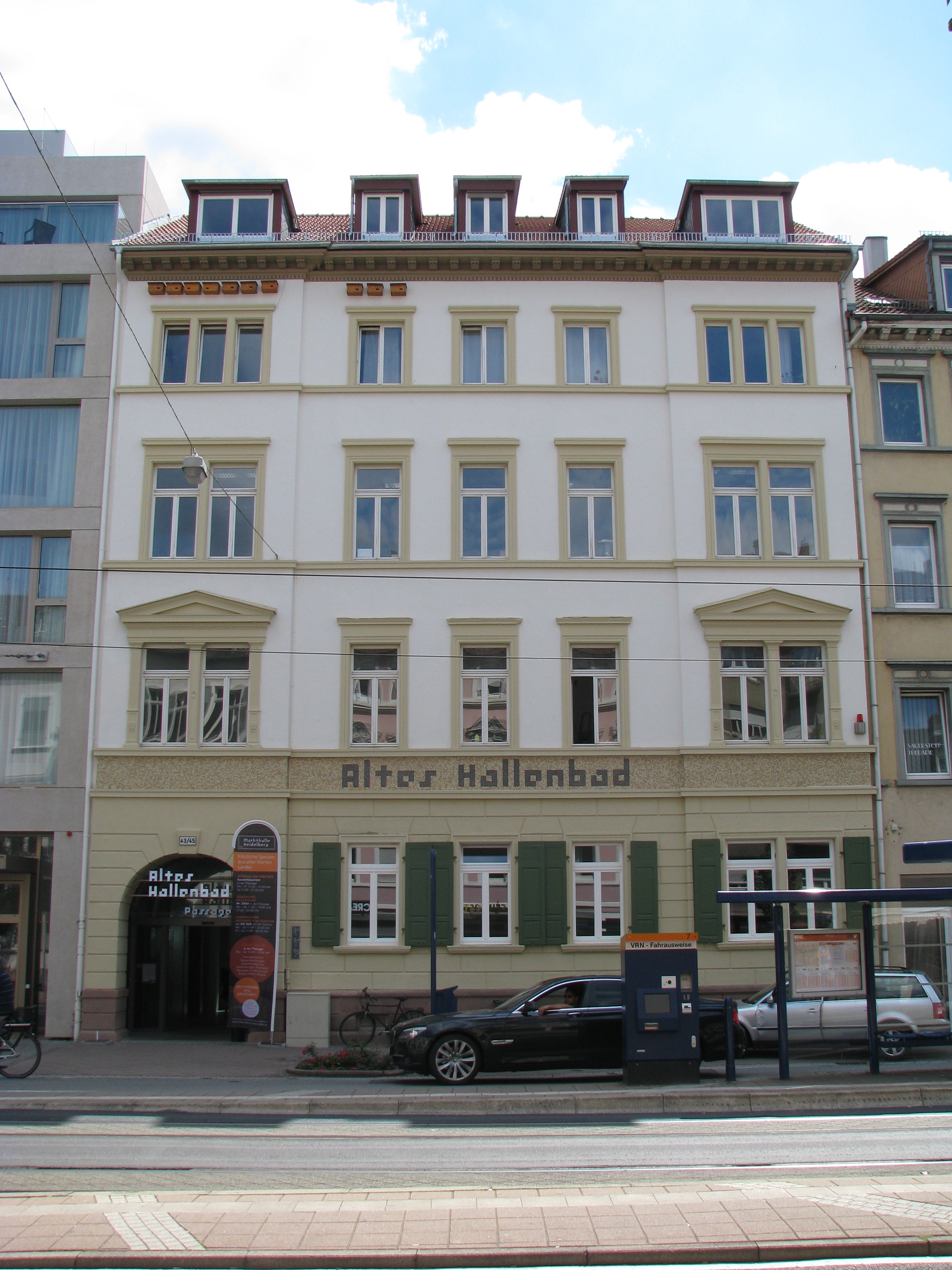 Das Alte Hallenbad in Heidelberg-Bergheim: Ansicht von der Bergheimer Straße